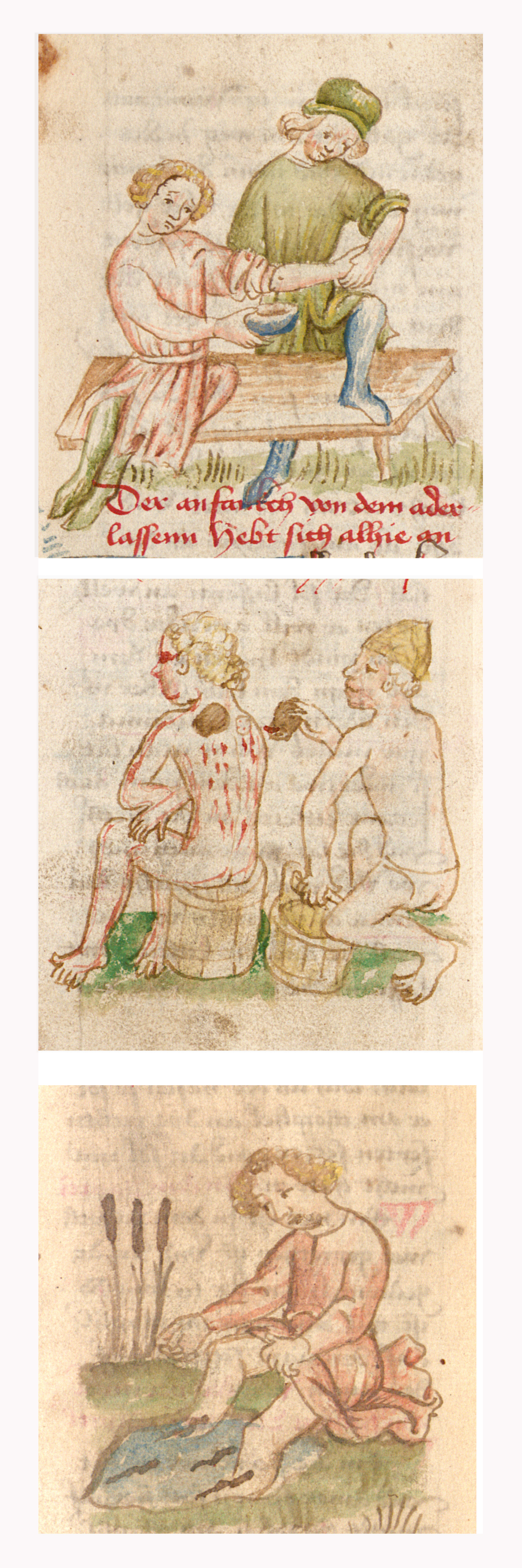 Abbildungen vom Aderlass, vom Schröpfen und von der Blutegelbehandlung